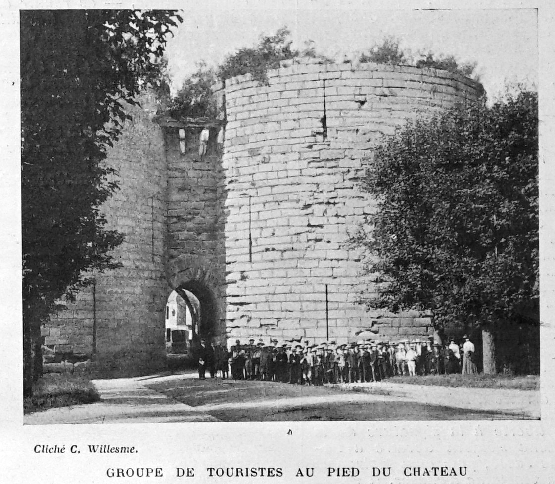 publié dans le "Bulletin de l'œuvre des voyages scolaires".